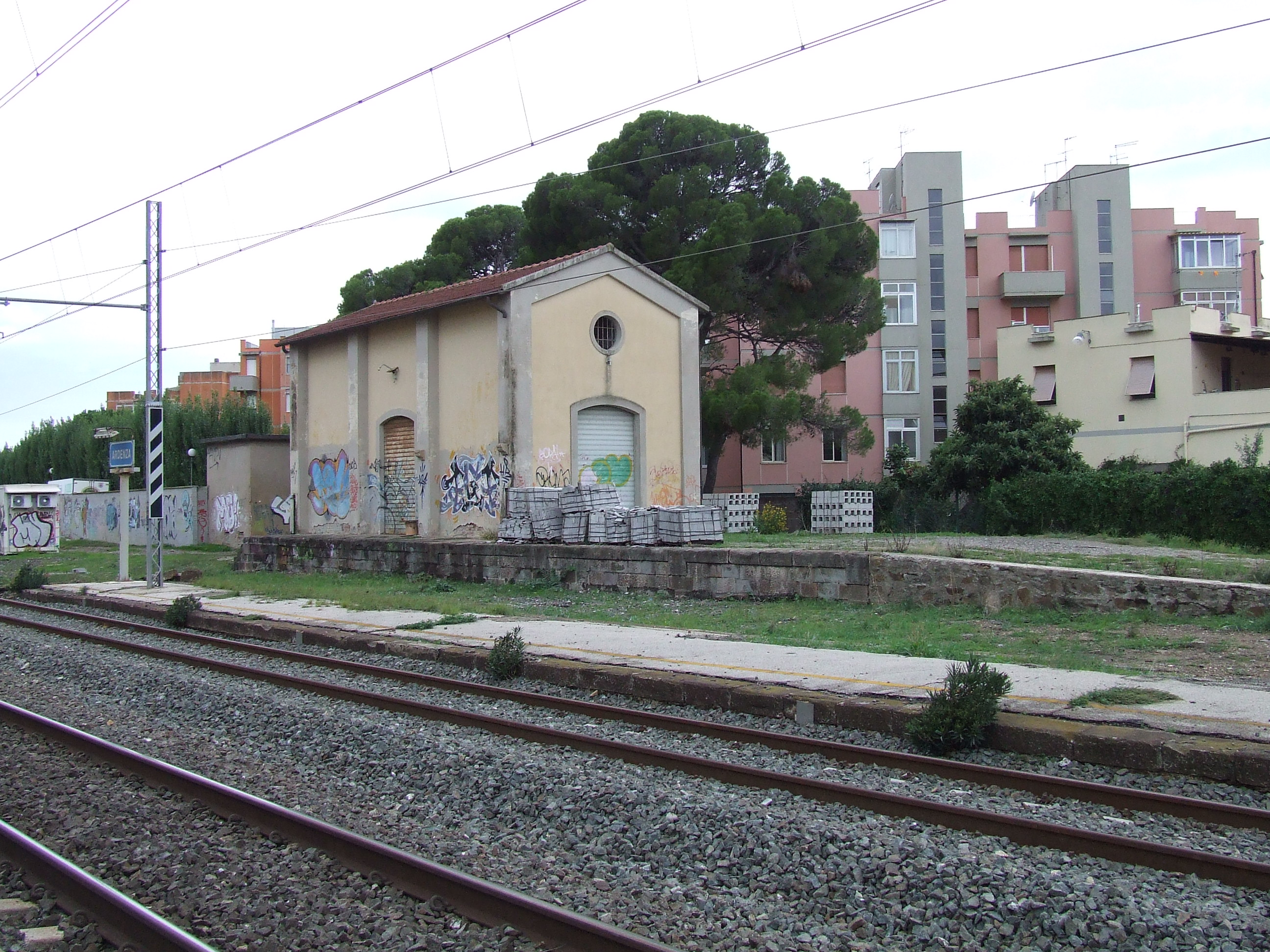 Vecchio ed inutilizzato merci della stazione di Ardenza, a Livorno